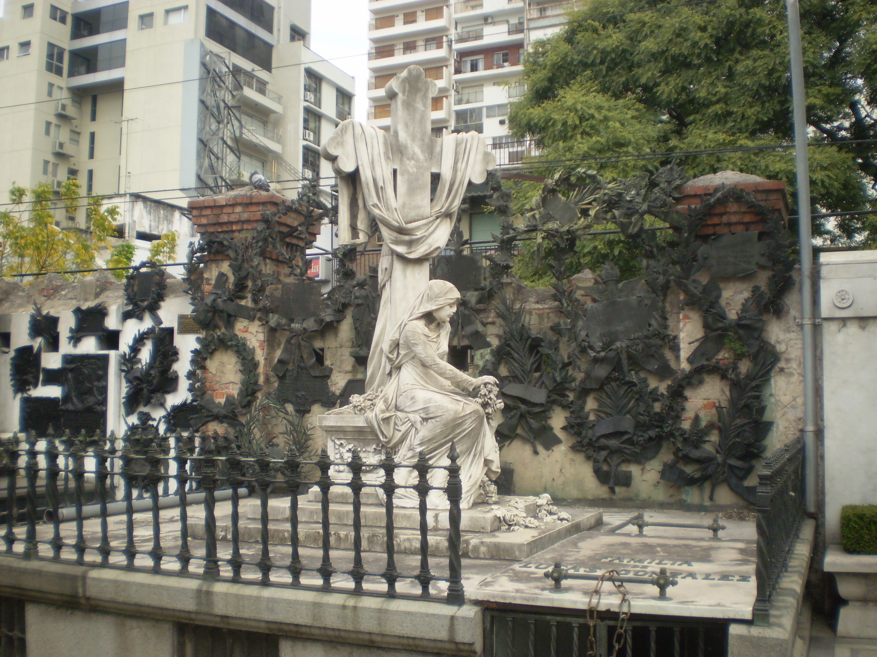 Monumento fúnebre de Roque Saenz Peña, Cementerio de la Recoleta, Buenos Aires.